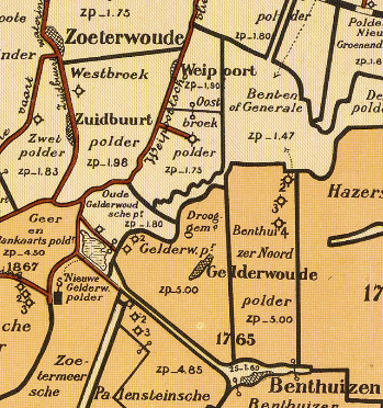 Polder haasbroek